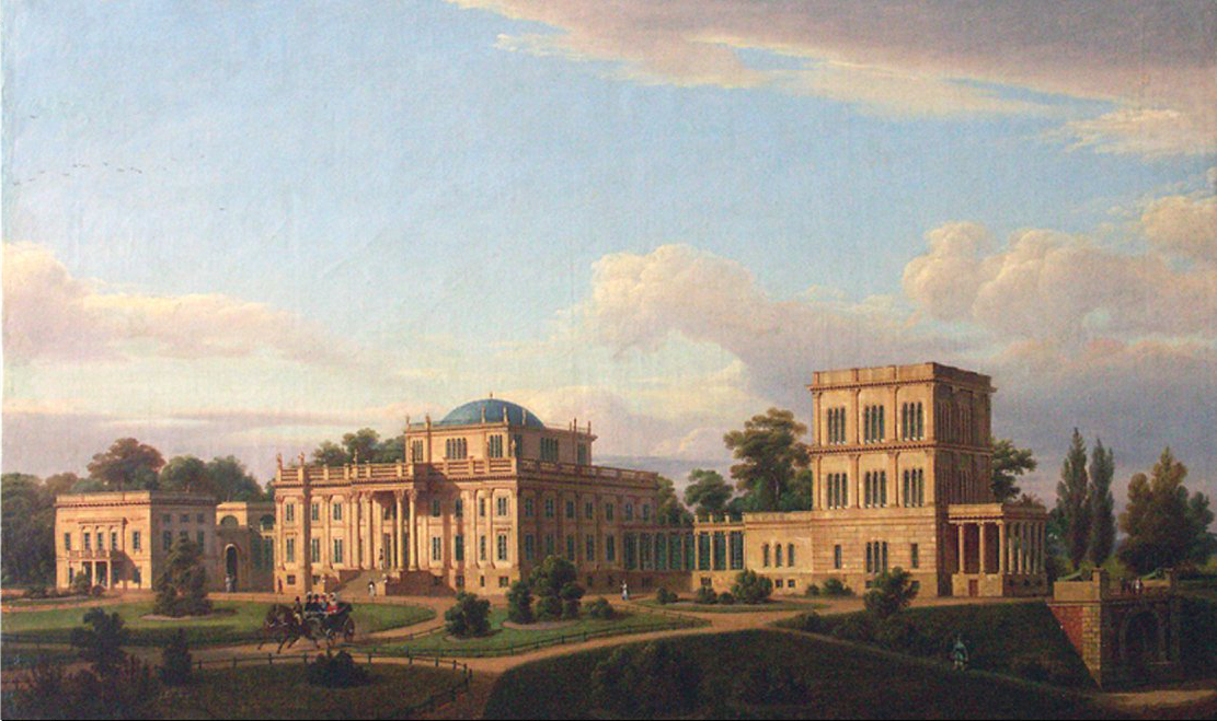 Беларуская (тарашкевіца): Гомель (Homiel), палац Румянцавых-Паскевічаў (Rumiancaŭ-Paskievič)